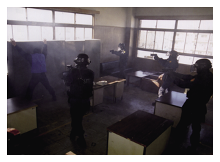 特殊事件対策としての突入・制圧訓練。